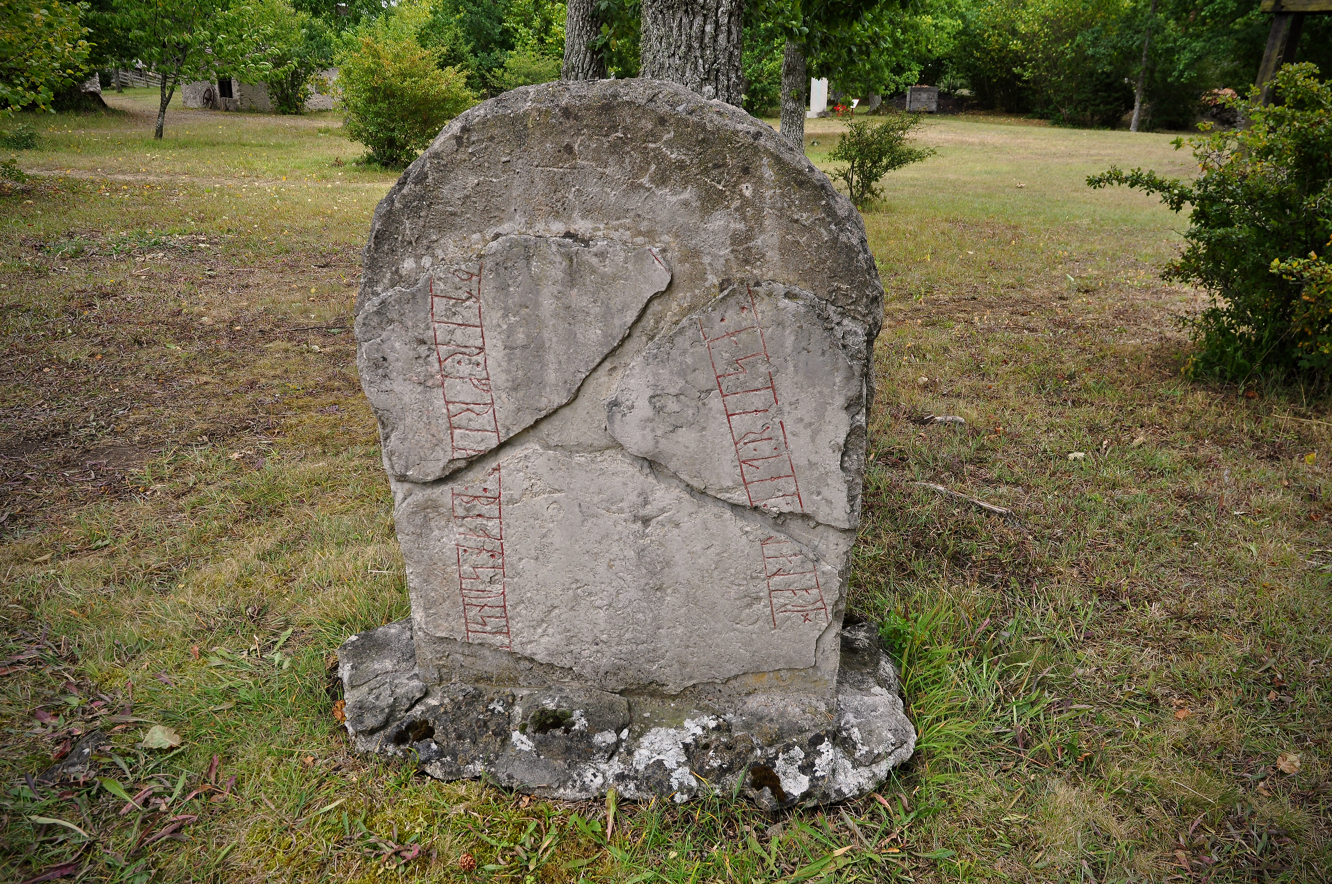 Bunge skolmuseum, Bungemuseet (Kulturhistoriskt museum, friluftsmuseum). Gotland, Fårösund G 325